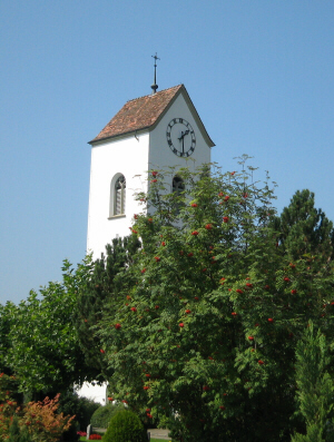 Kirche in Vechigen